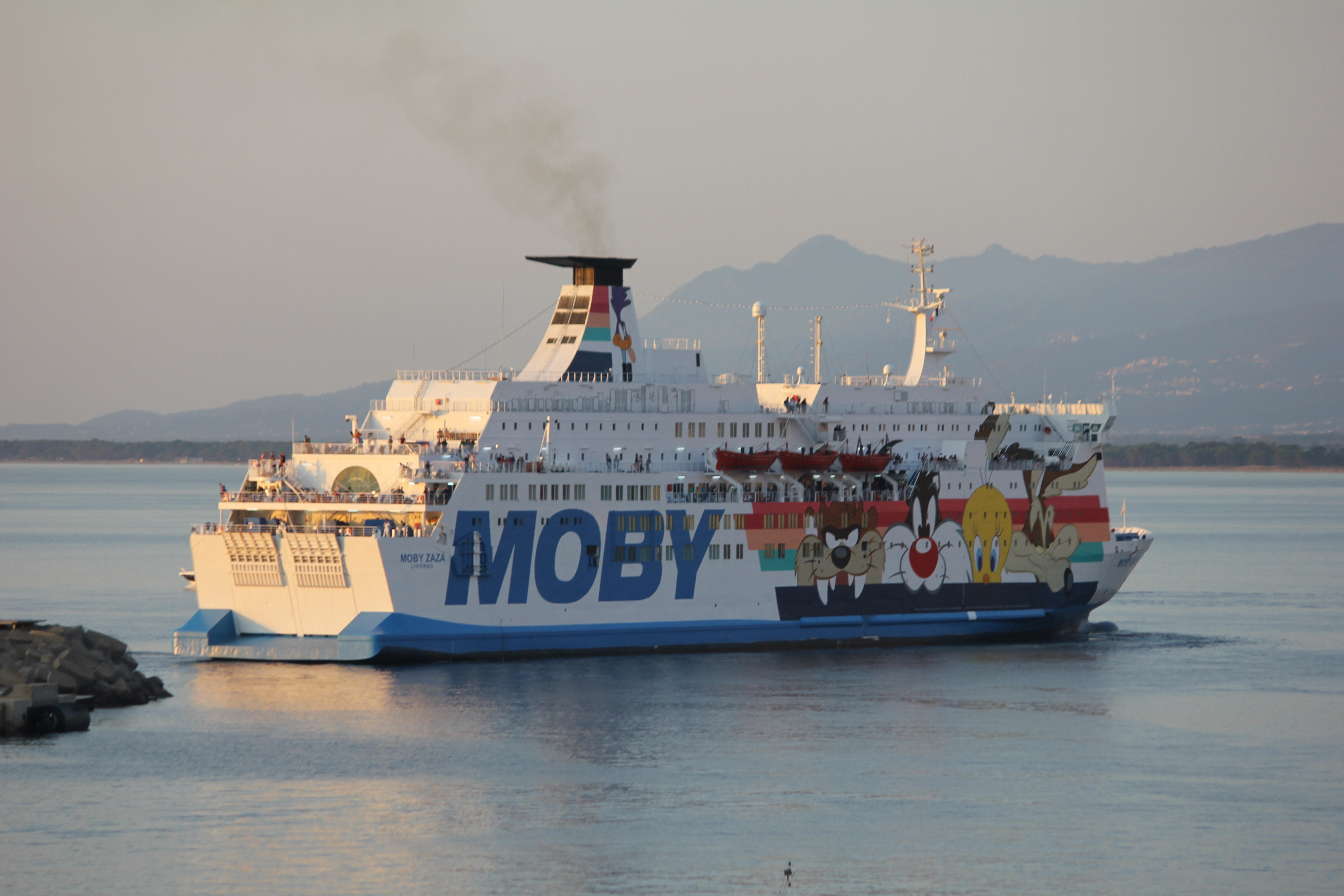 Traghetto Moby Zaza in fase d'ormeggio a Bastia.